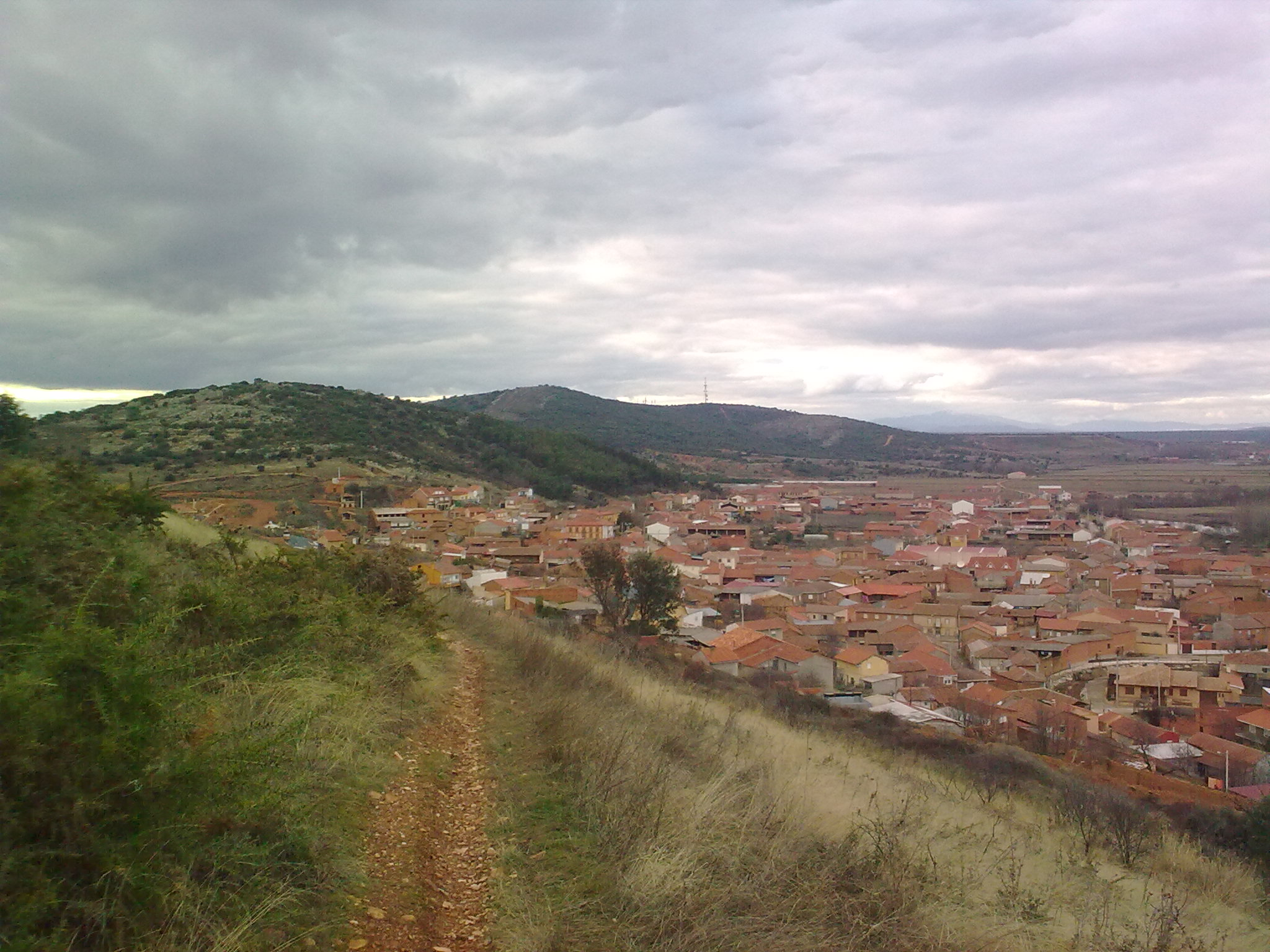 Vista de la localidad de Morales del Rey desde el Teso (Sierra de Carpurias)